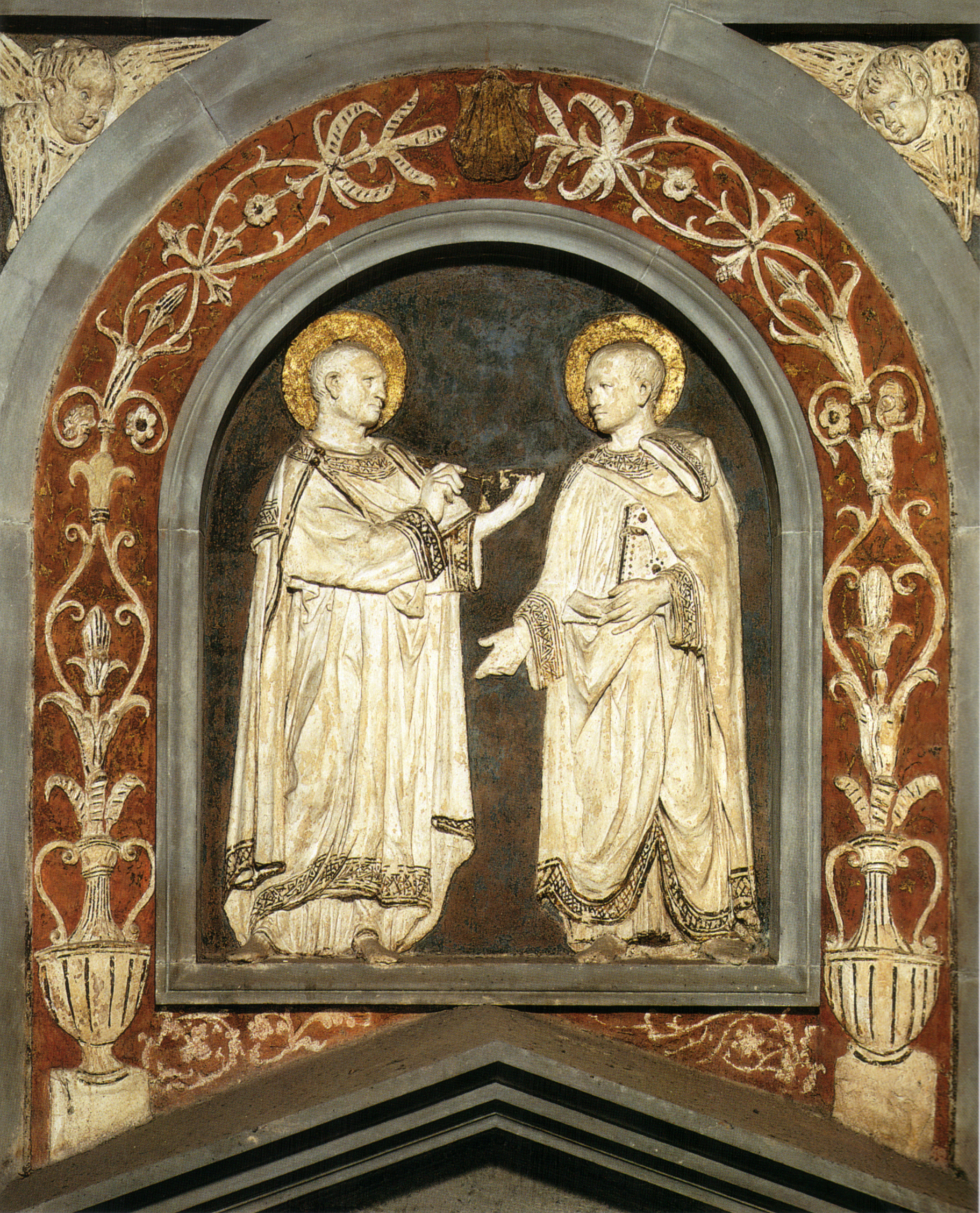 Donatello, santi cosma e damiano, 1434-43